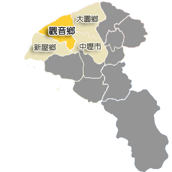 觀音鄉行政區劃